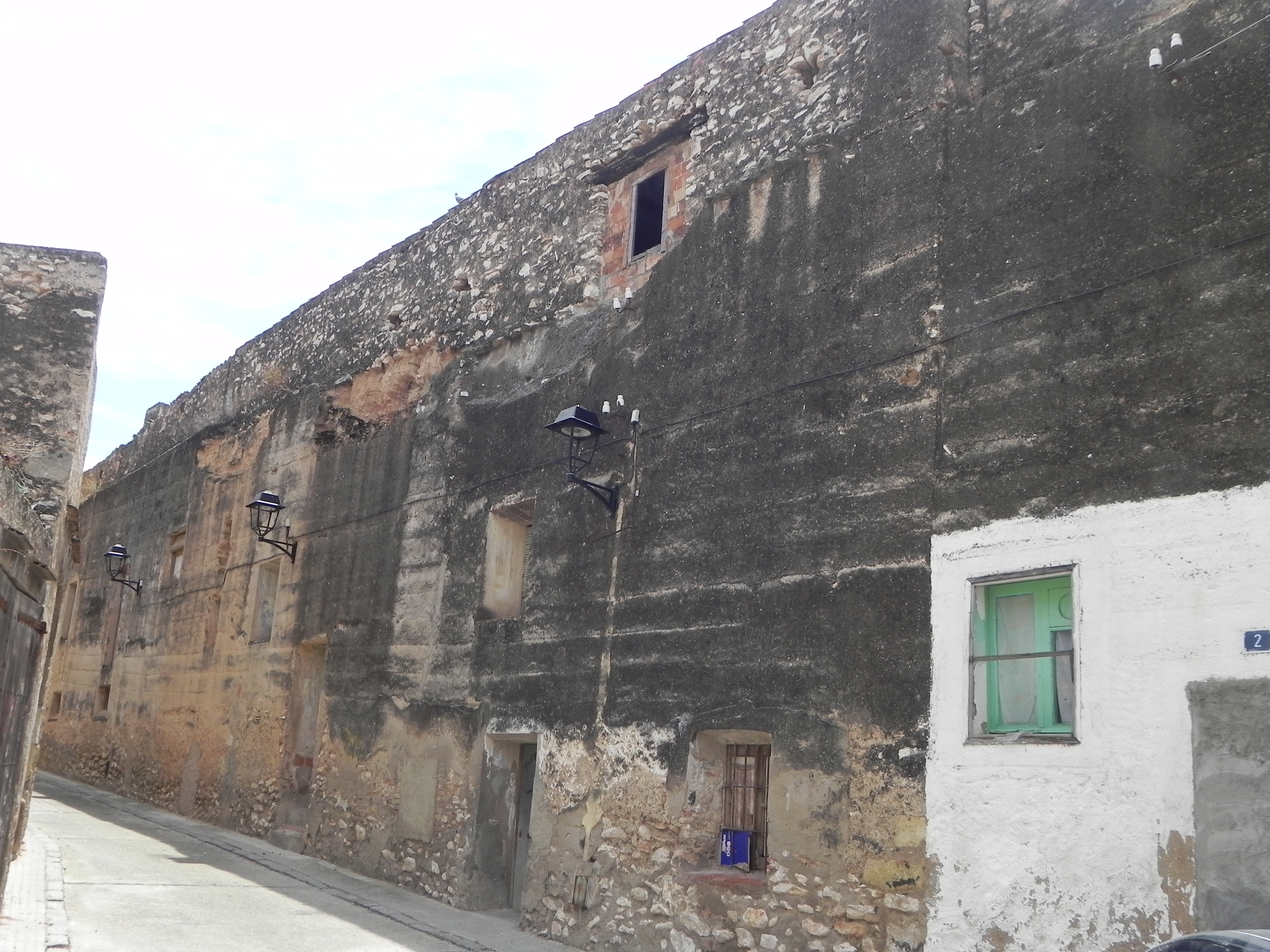 Muralla de Constantí dels segles XIII - XIV.